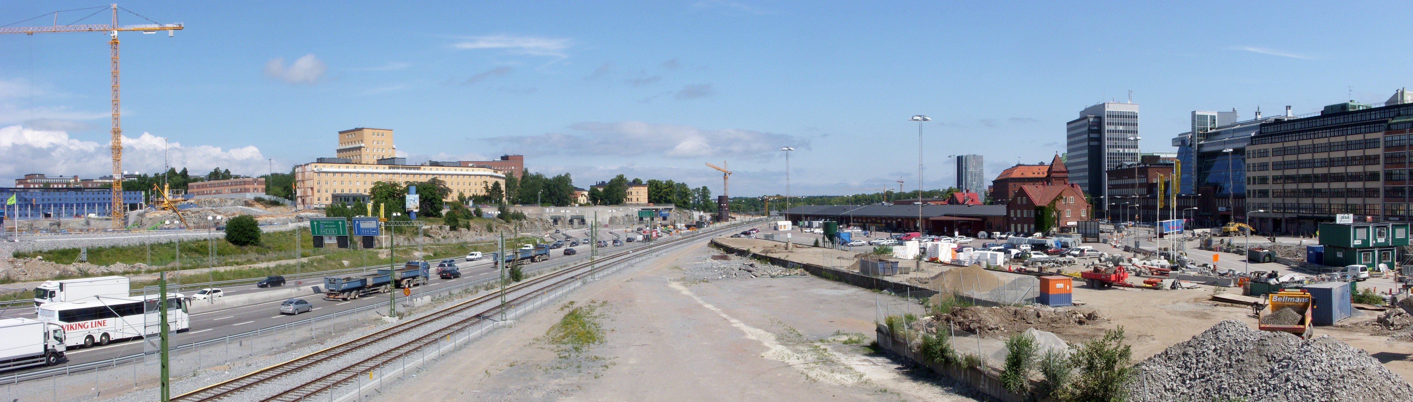 Platsen för blivande Hagastaden (Norra stationsområdet) från Solnabron mot öst